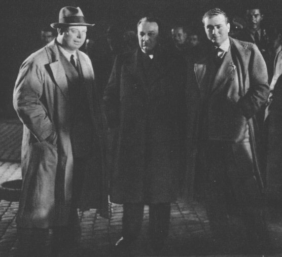 Jean Renoir, Michele Scalera e Vittorio Mussolini sul set di Tosca (Renoir + Koch, 1941)